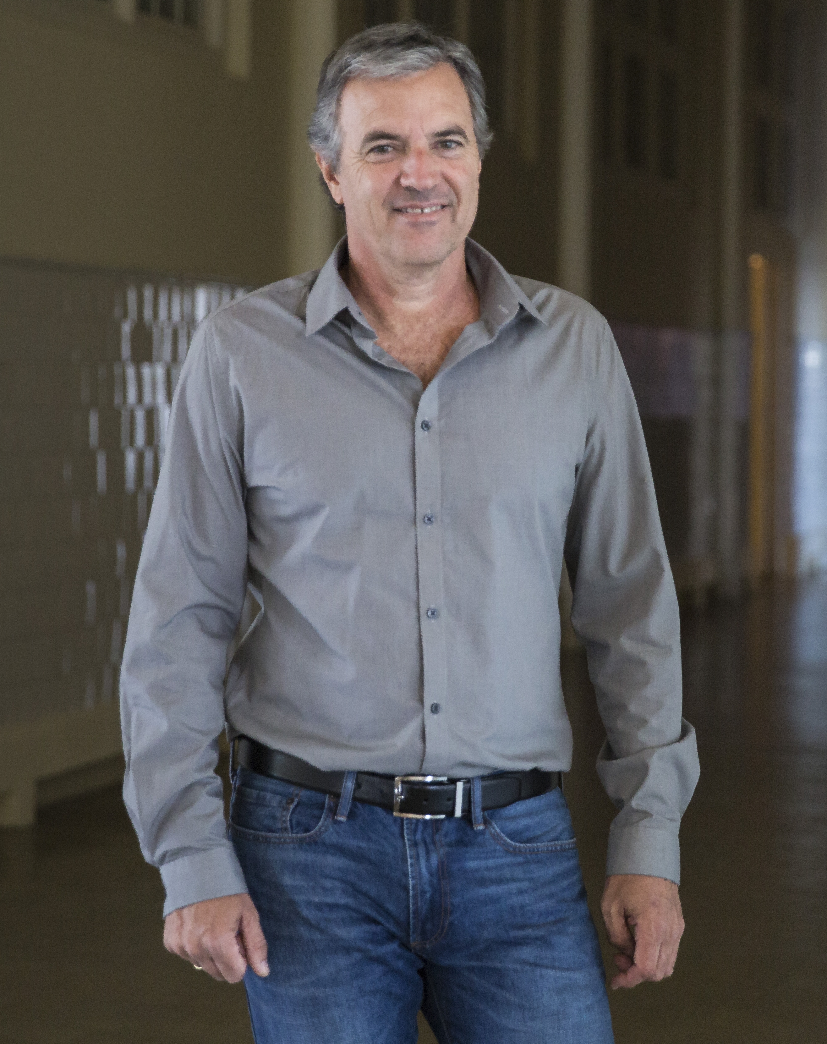 Buenos Aires, 18 de marzo de 2017 - Entrevista a Javier Frana en el Museo de los Inmigrantes.